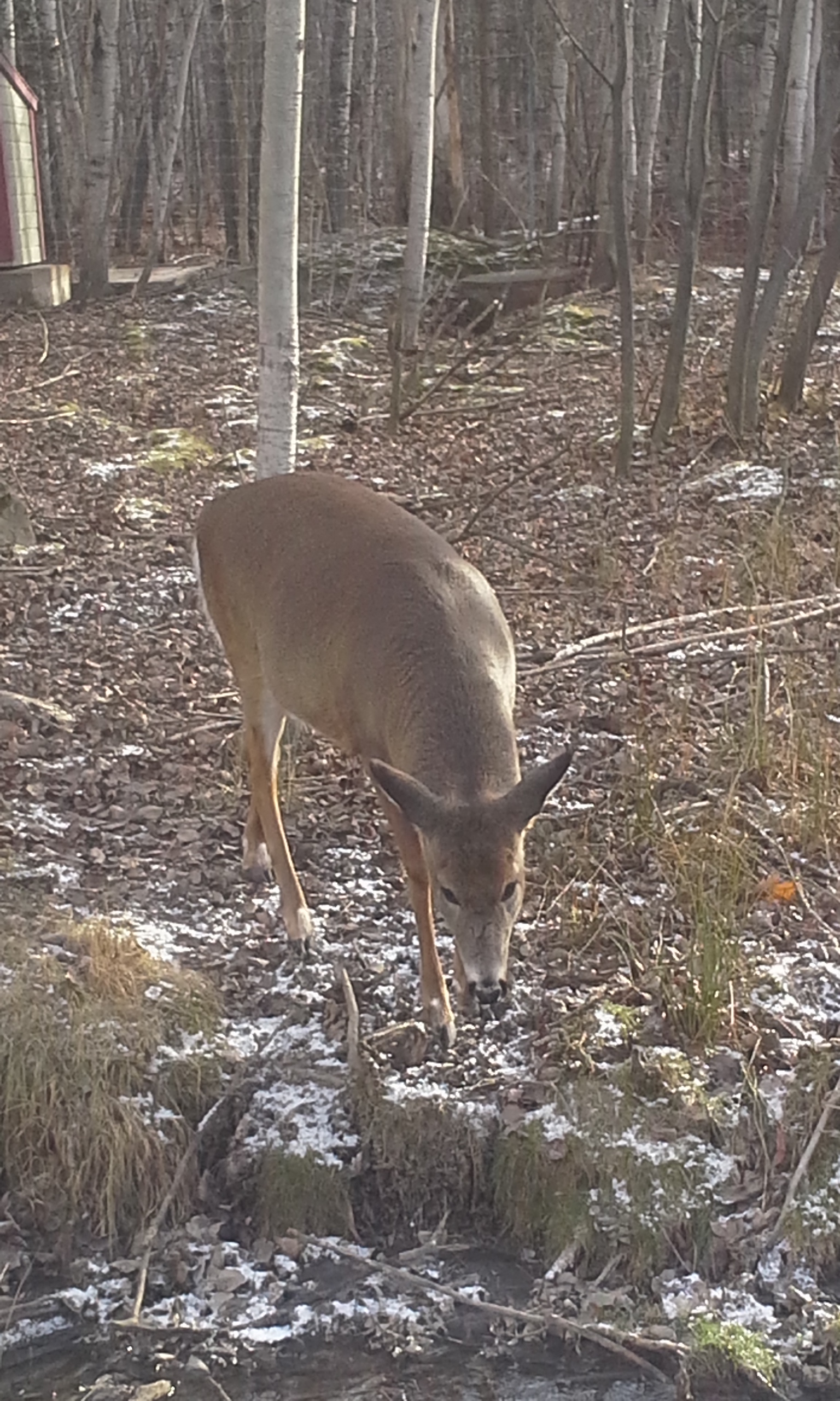 Chevreuil nommé Bibi du Centre de la biodiversité du Québec